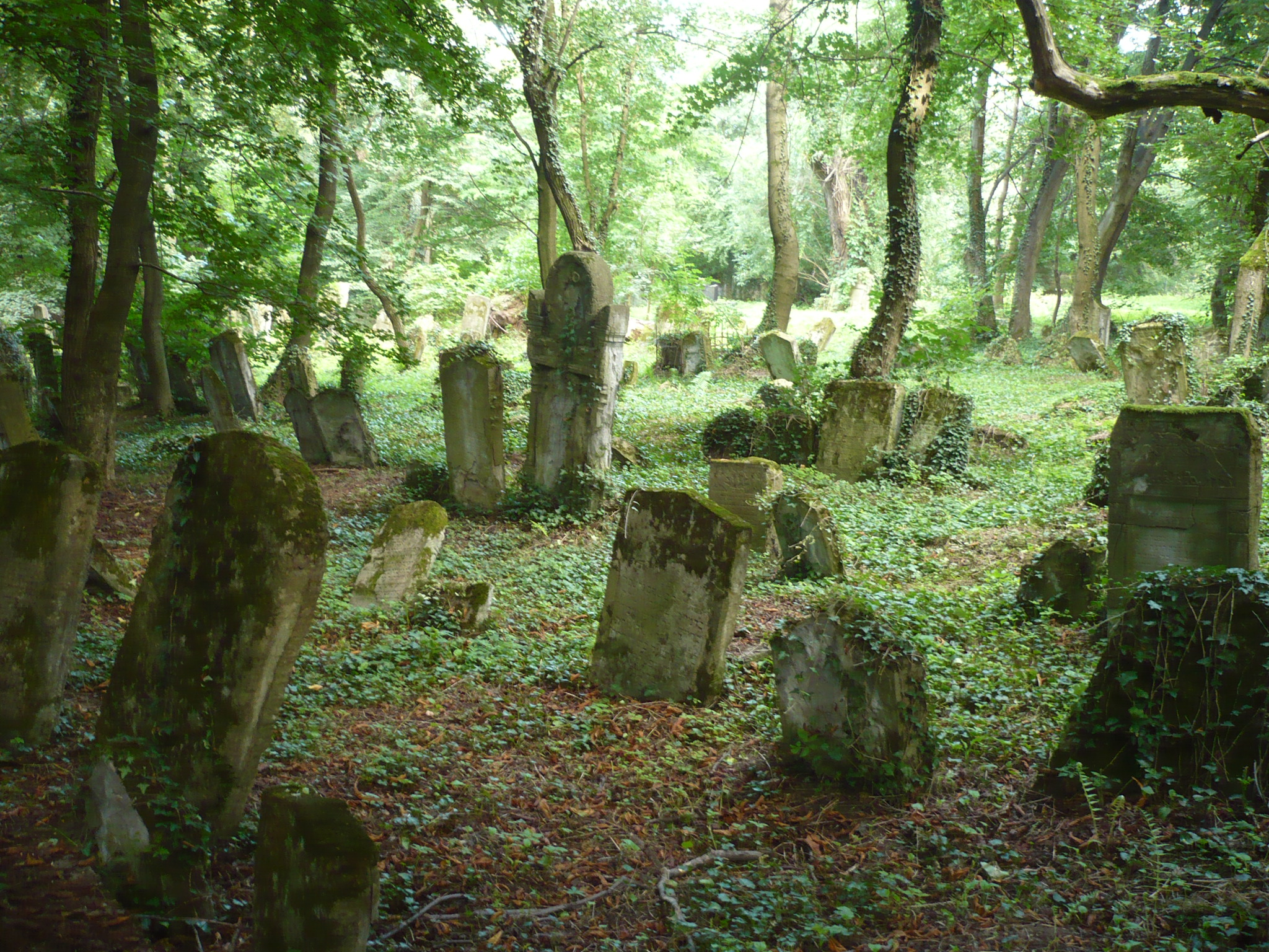 Przemyśl, nowy cmentarz żydowski